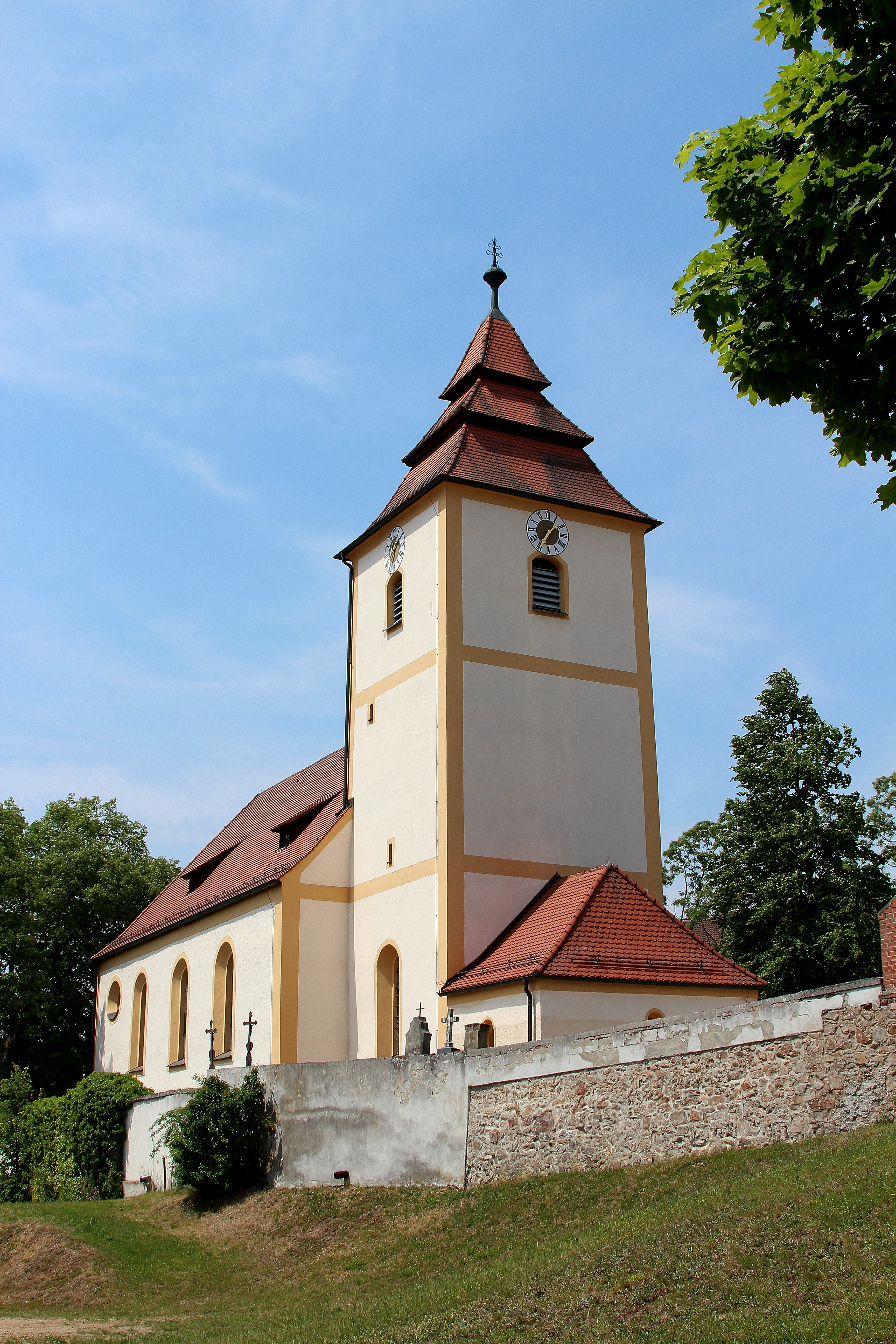 St. Emmeram, Oberköblitz; Markt Wernberg-Köblitz, Landkreis Schwandorf, Oberpfalz, Bayern